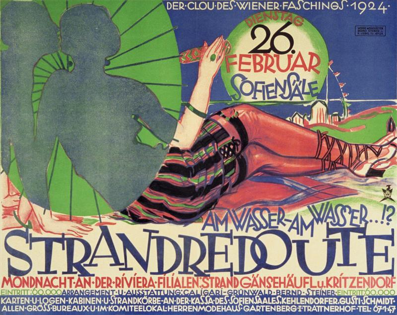 Strandredoute - Sofiensäle und Gänsehäufl 1924 Druck: Werbe-Werkstätten Bernd Steiner und K. Liebel, Wien 1924 Lithographie, 85 cm x 106 cm ÖNB Bildarchiv und Grafiksammlung (POR), Signatur PLA16308877